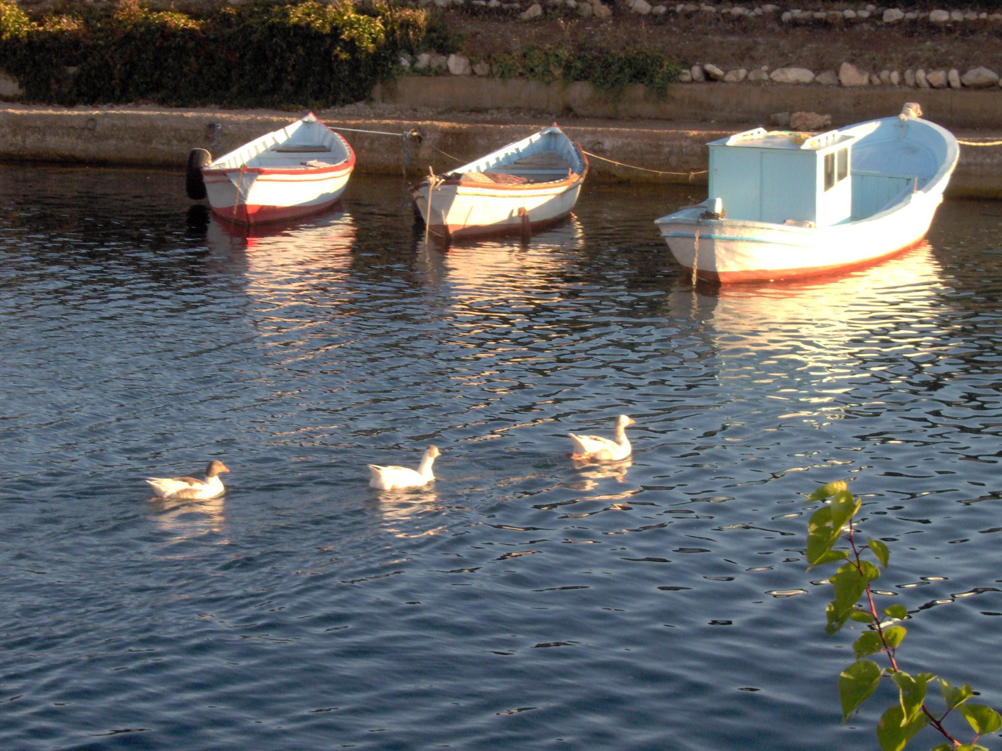 שלושה ברווזים ושלוש סירות. אגירדיר, טורקיה